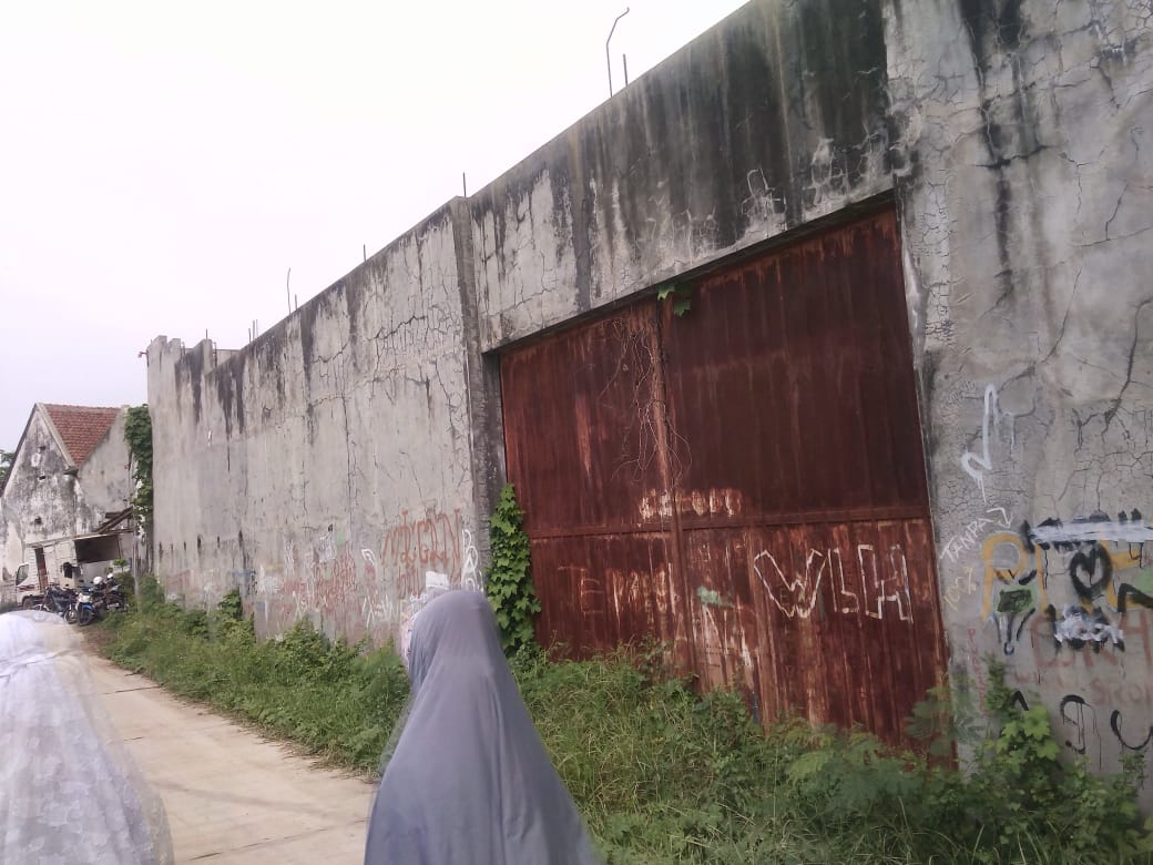 Bekas gudang Stasiun Welahan